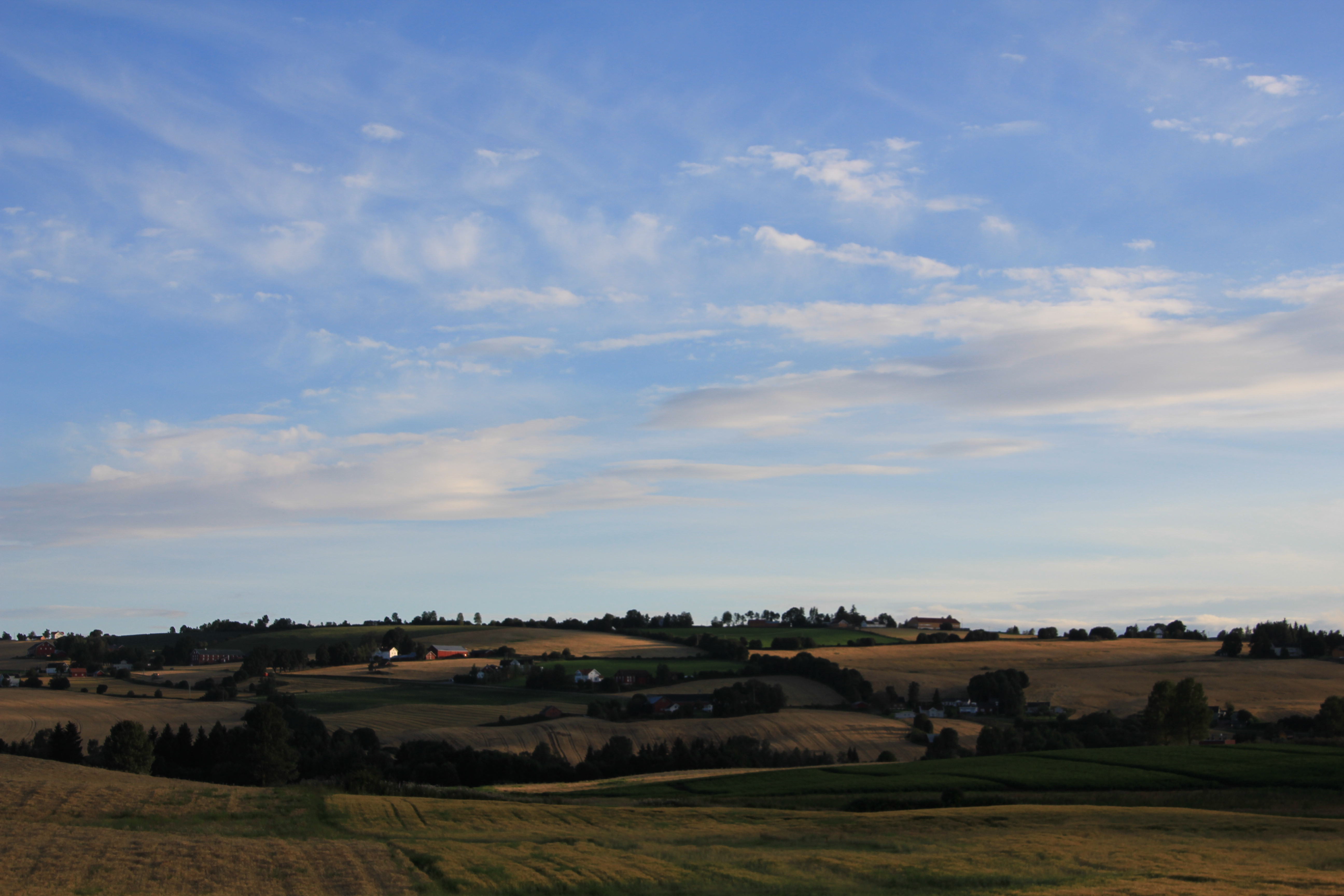 Kveldslys over Lensbygda.